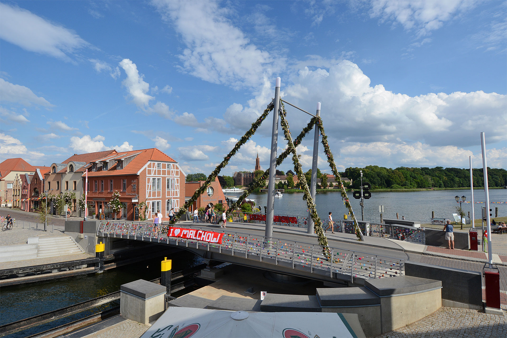 Die Drehbrücke in Malchow verbindet die Insel mit dem westlichen Festland.